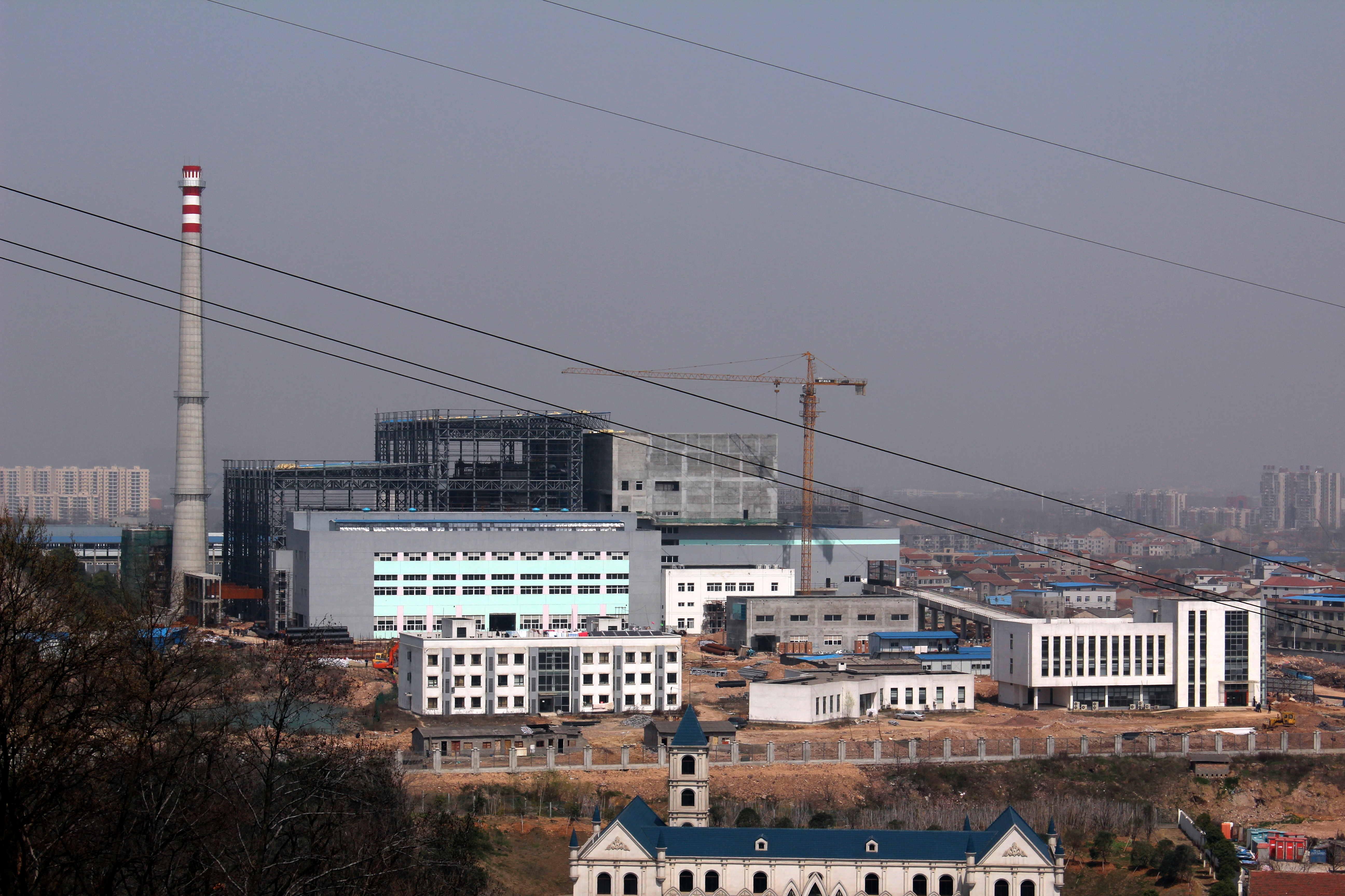 从扁担山北坡眺望建设中的汉阳锅顶山生活垃圾焚烧发电厂。